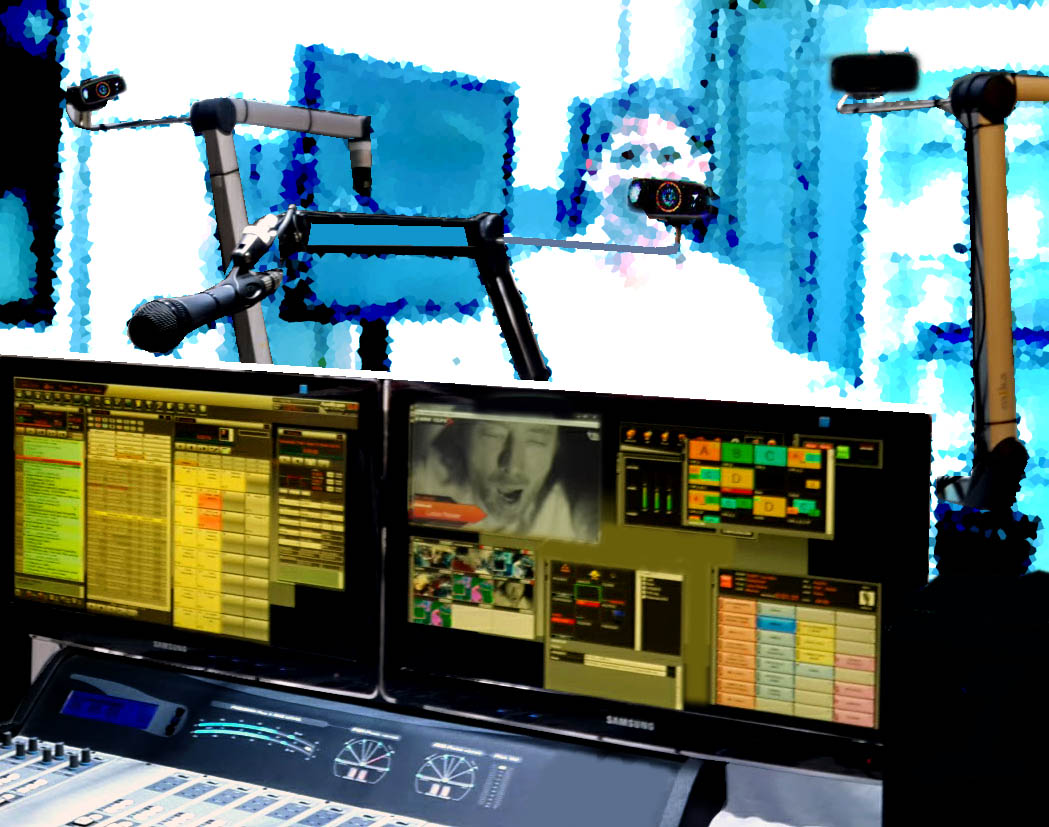 Vista de un estudio de Radio Visual con los micrófonos y las cámaras USB